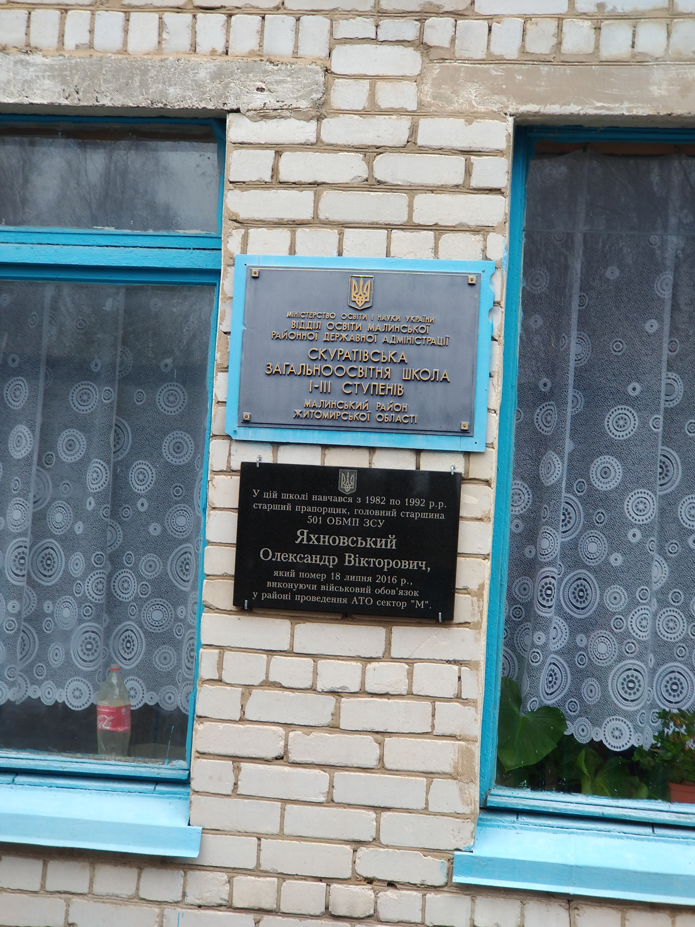 Фасад школи в с. Скурати Малинського району Житомирської області